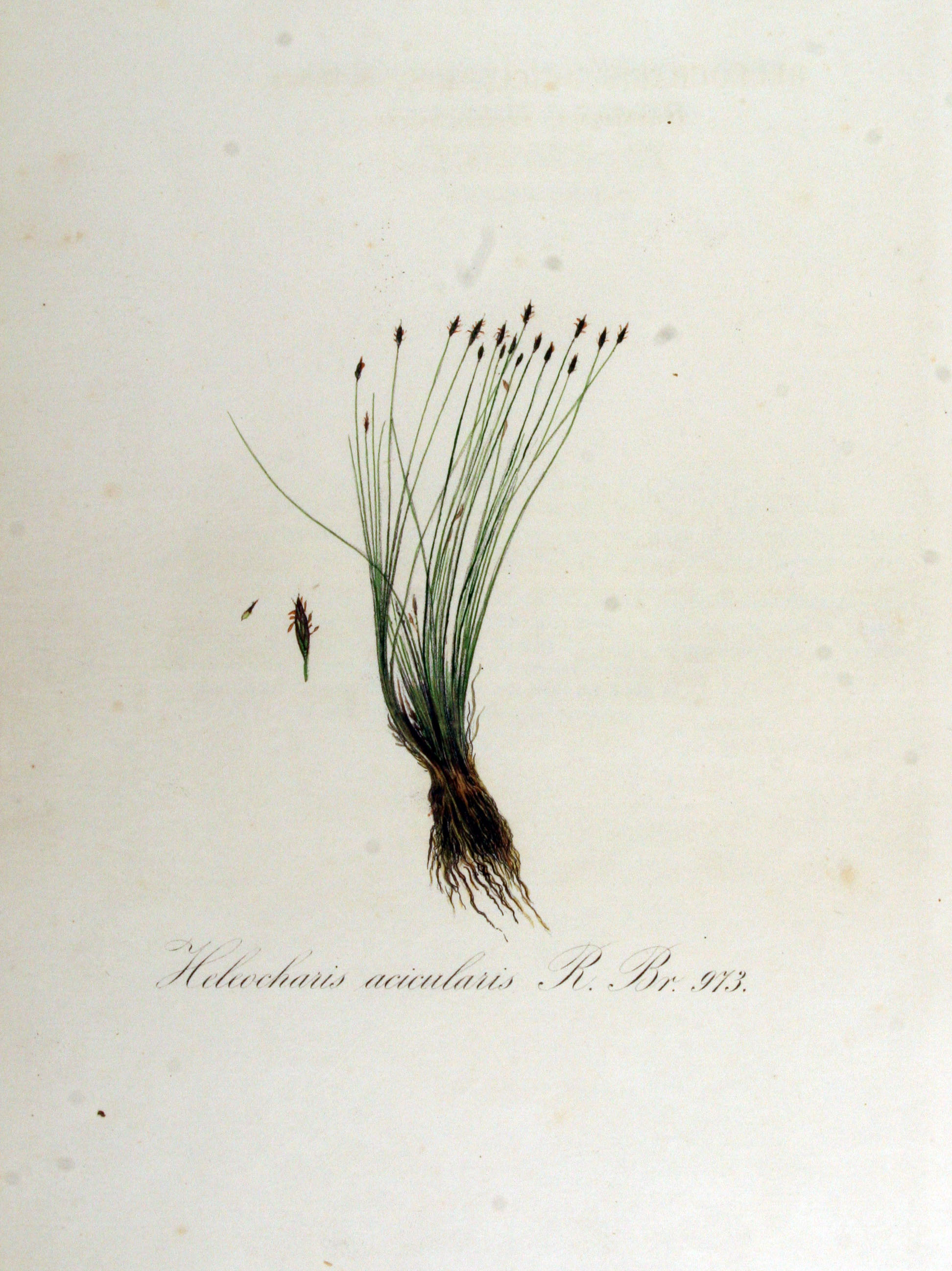 Eleocharis acicularis (L.) Roem. & Schult. (Syn. Heleocharis acicularis (L.) R. Br.)